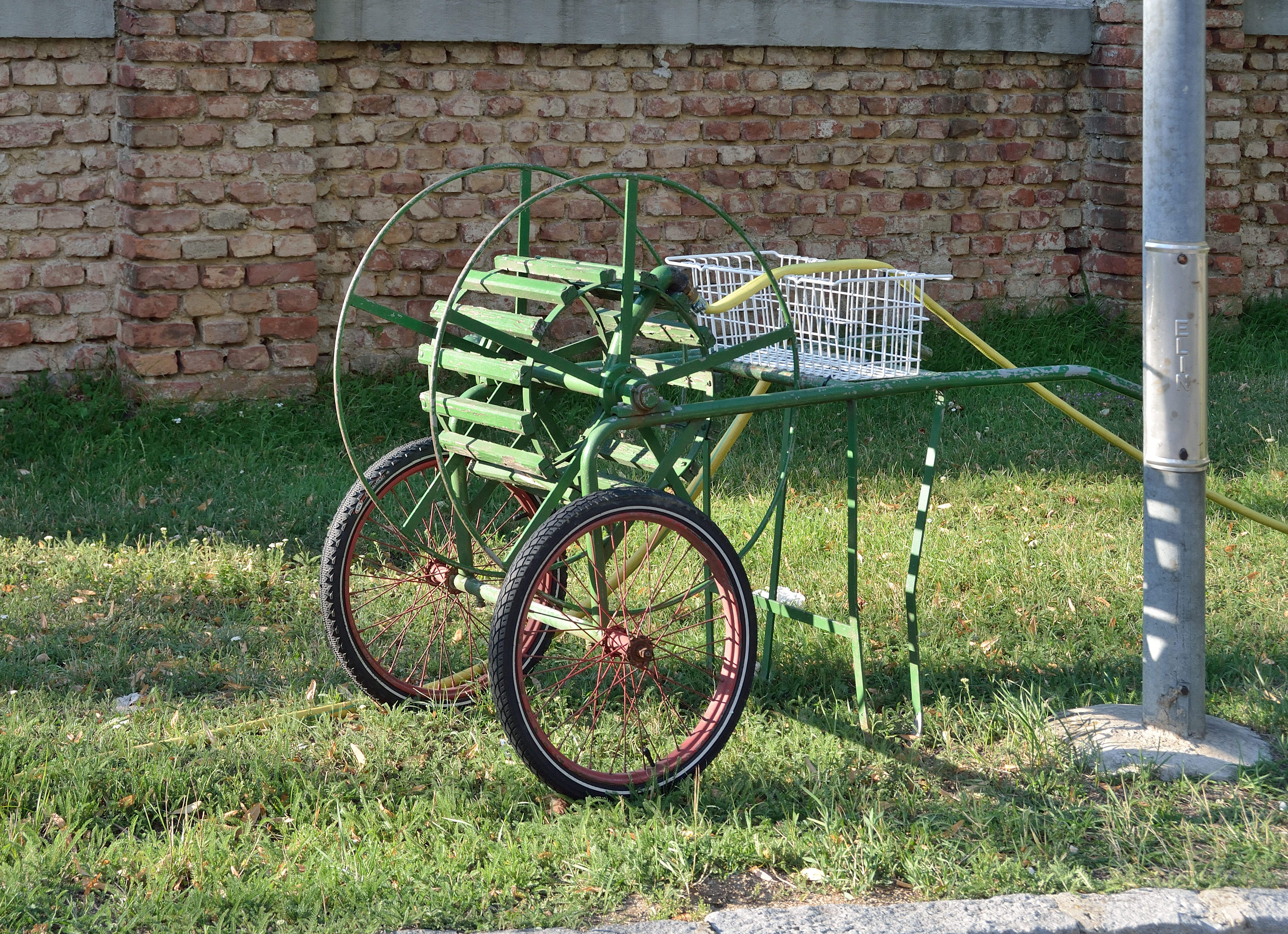 Sozialmedizinisches Zentrum Süd - Kaiser-Franz-Josef-Spital in Wien-Favoriten. Älteres Modell eines Schlauchwagens.